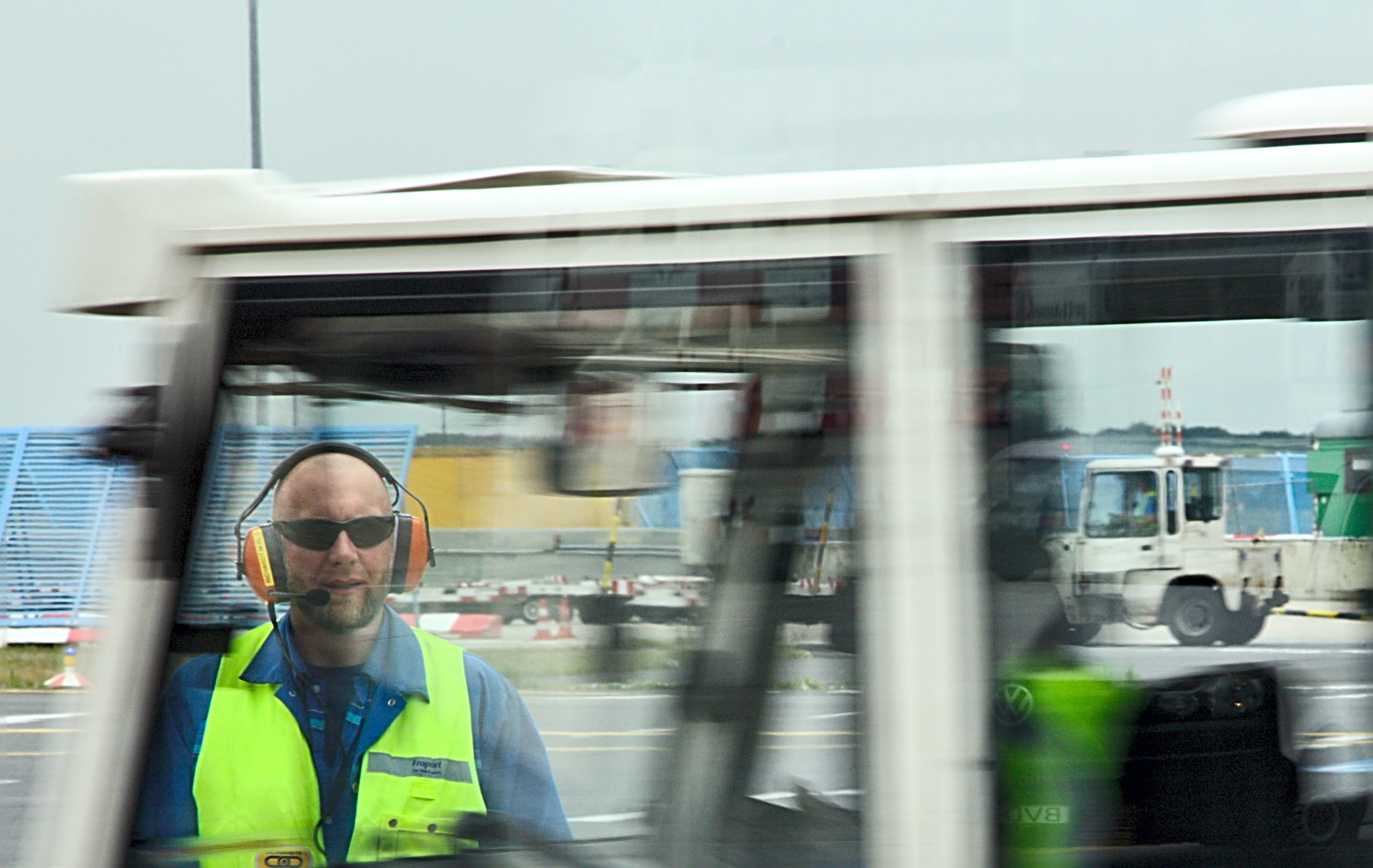 Marshaller at Frankfurt/Main Airport, Germany.